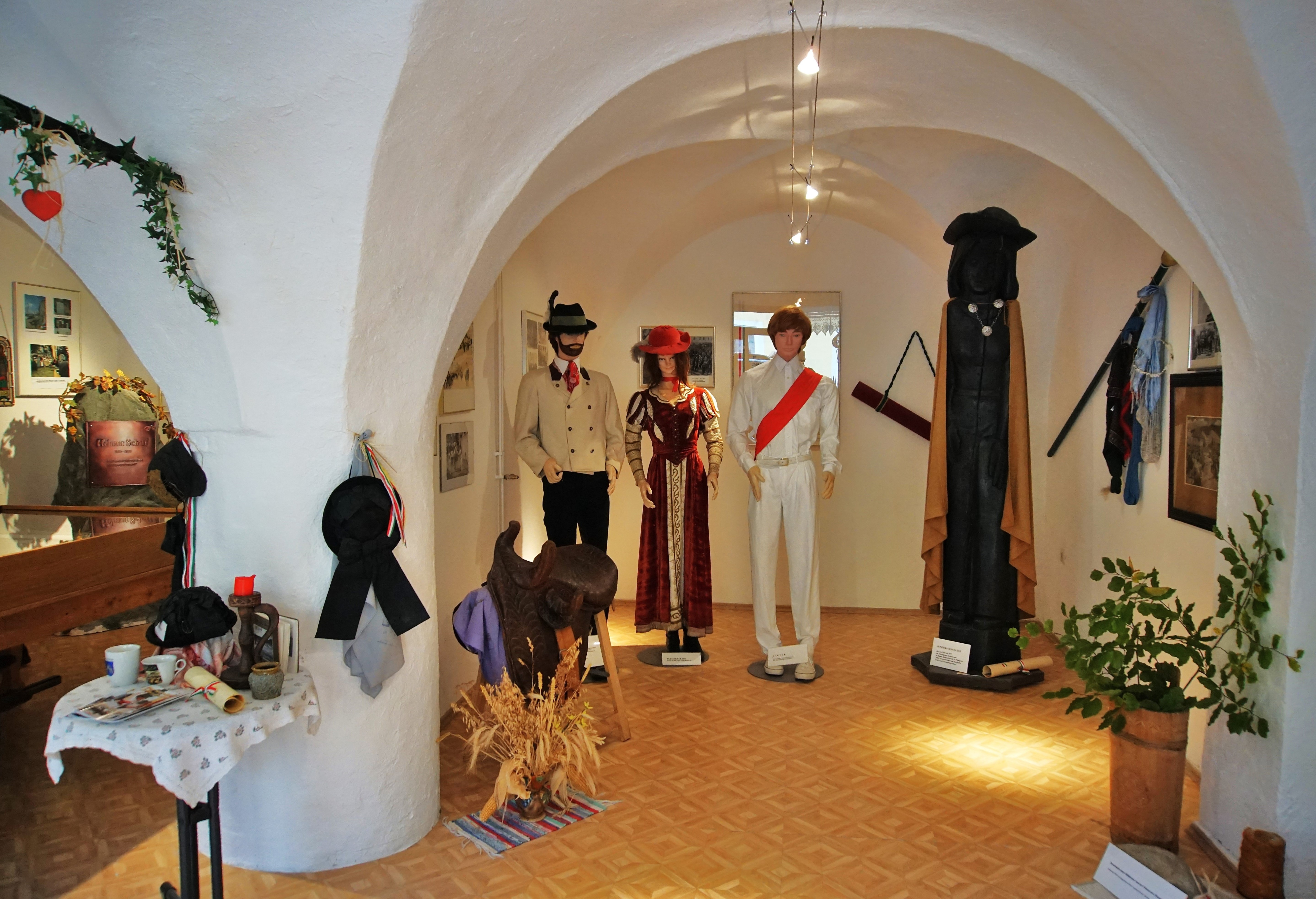 Weitensfeld im Gurktal, Blick in das Brauchtum Museum